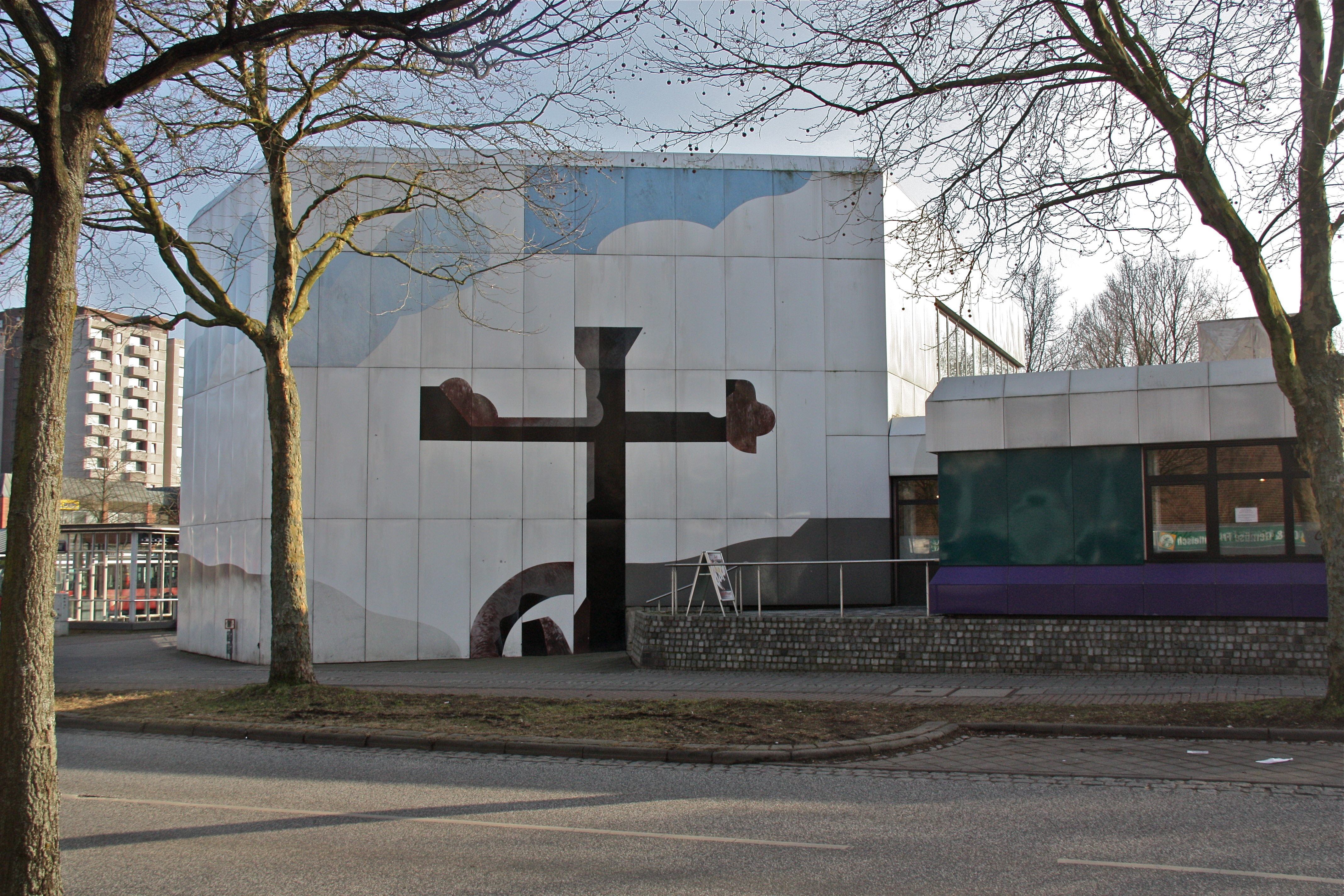 Hamburg, Billstedt, Mümmelmannsberg, Evangelisches Gemeindezentrum, Front zum Havighorster Redder. Baujahr 1976